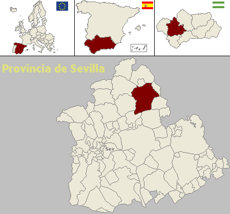 Mapa de localización del municipio sevillano de Constantina (Andalucía, España)